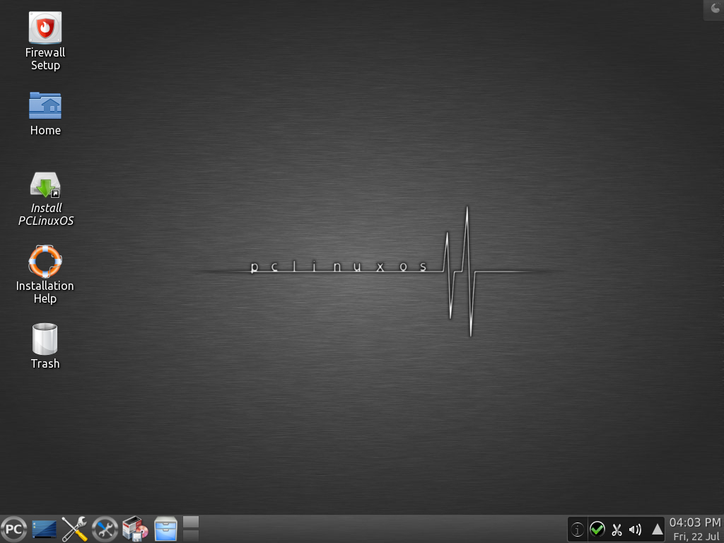 Pantallazo del escritorio de PCLinuxOS 2011.7 MiniMe con KDE 4.6.4.